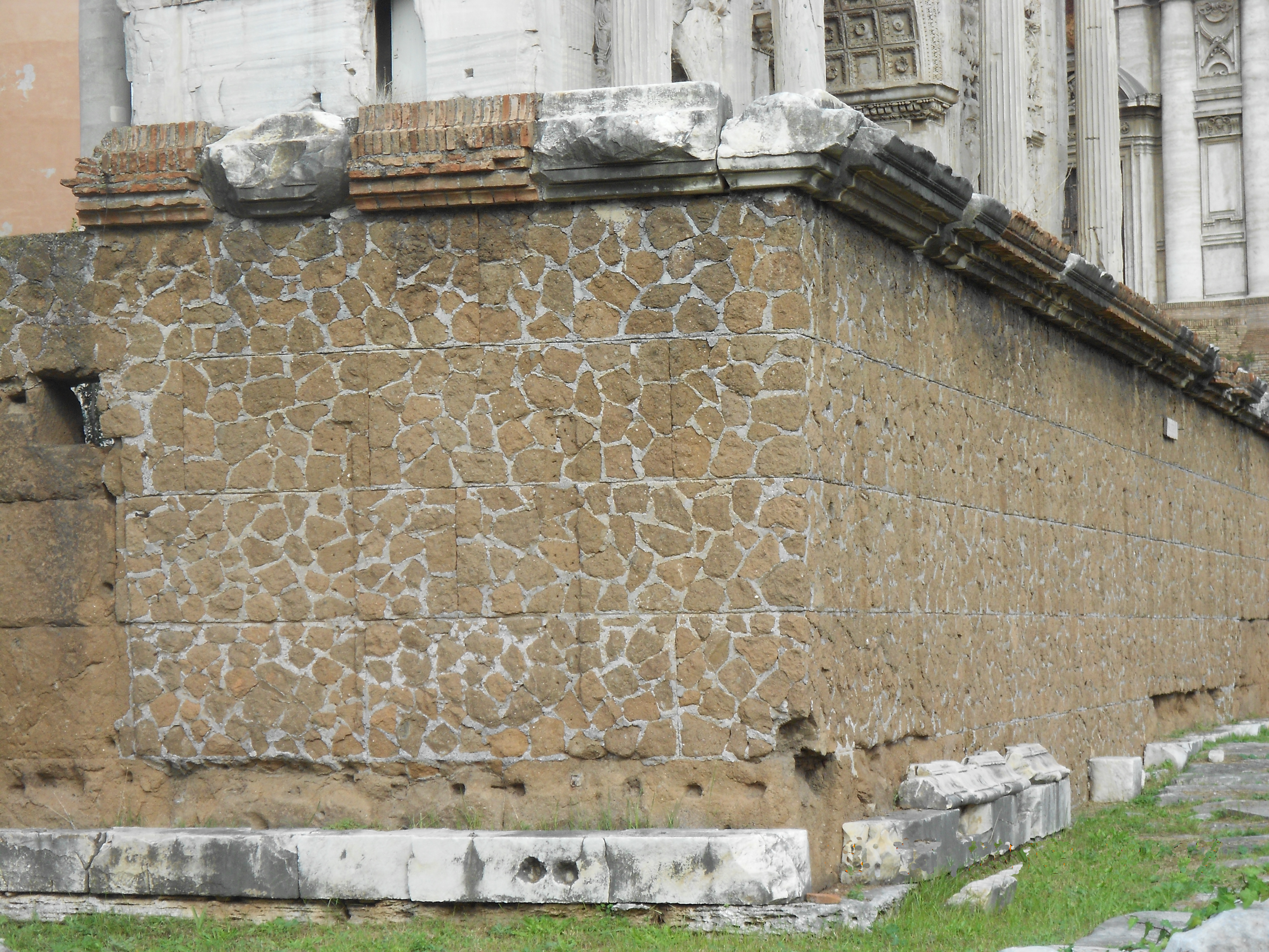 Die Rostra auf dem Forum Romanum. An der Stirn/Längsseite befinden sich die die Löcher, welche für die Befestigung der Schiffsschnäbel vorgesehen waren.